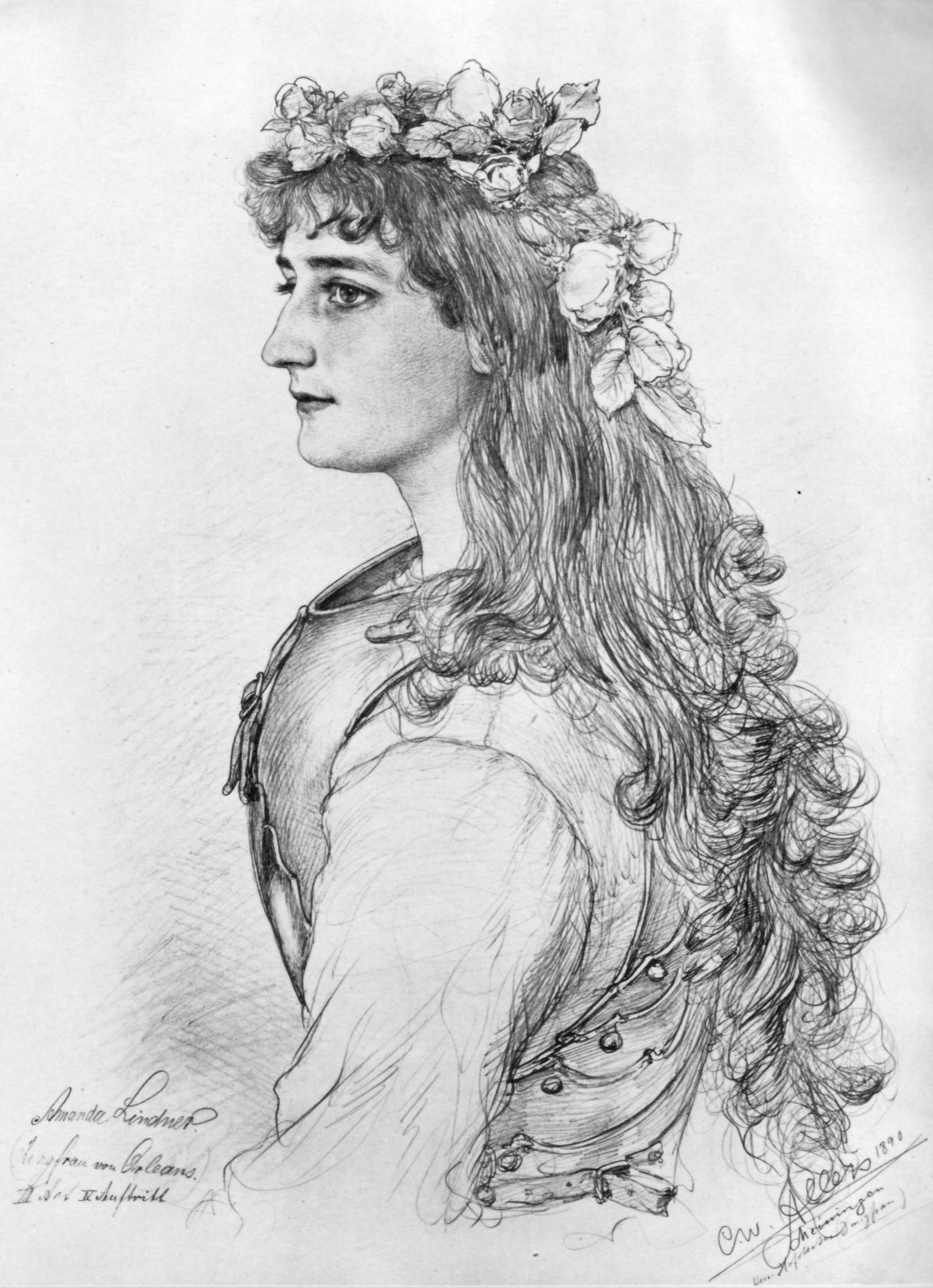 Porträt der Schauspielerin Amanda Lindner